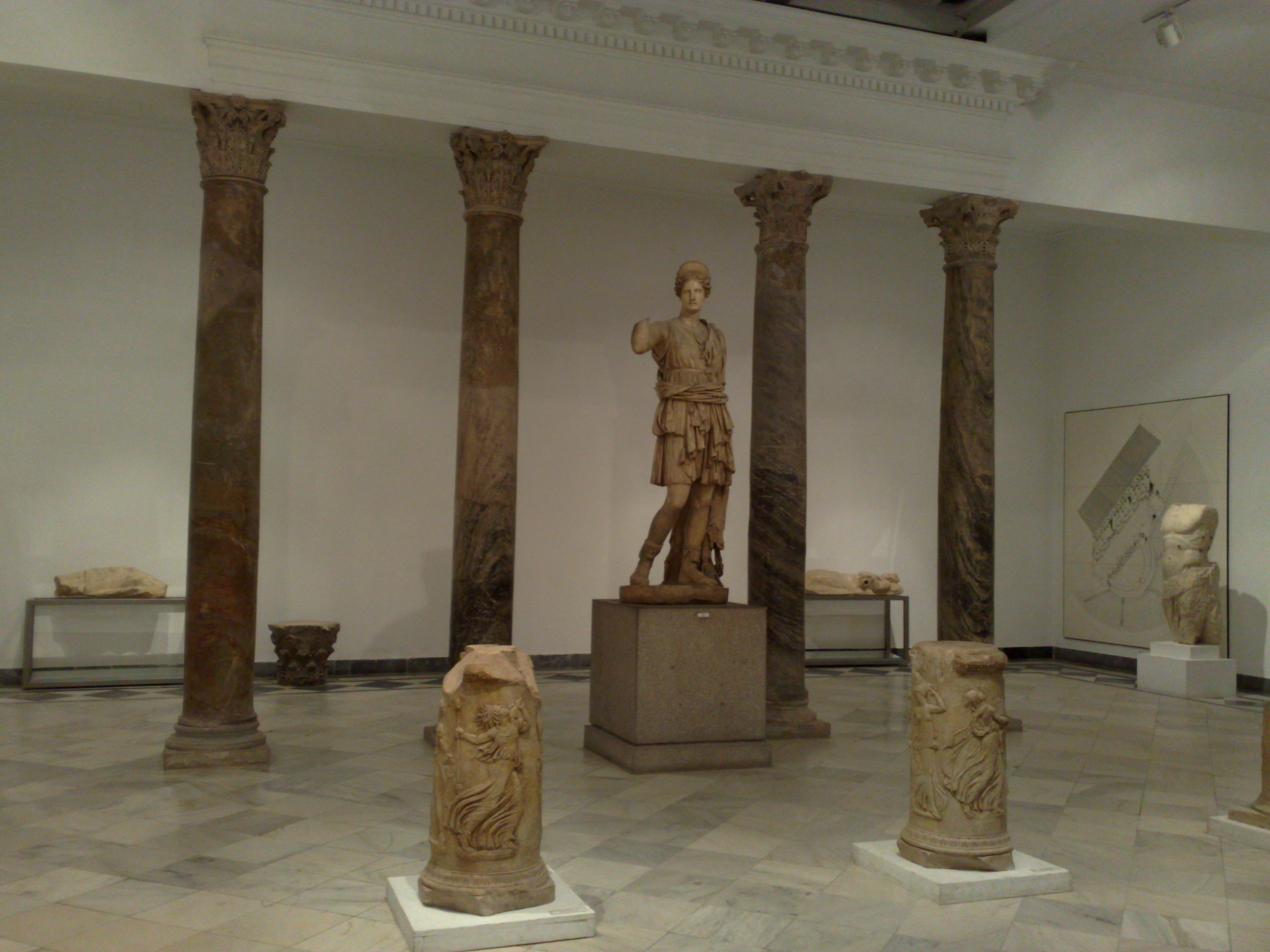 Museo arqueológico de Sevilla. Estatua de la diosa Diana, hallada en el conjunto monumental romano de Itálica en Santiponce, Sevilla (España).